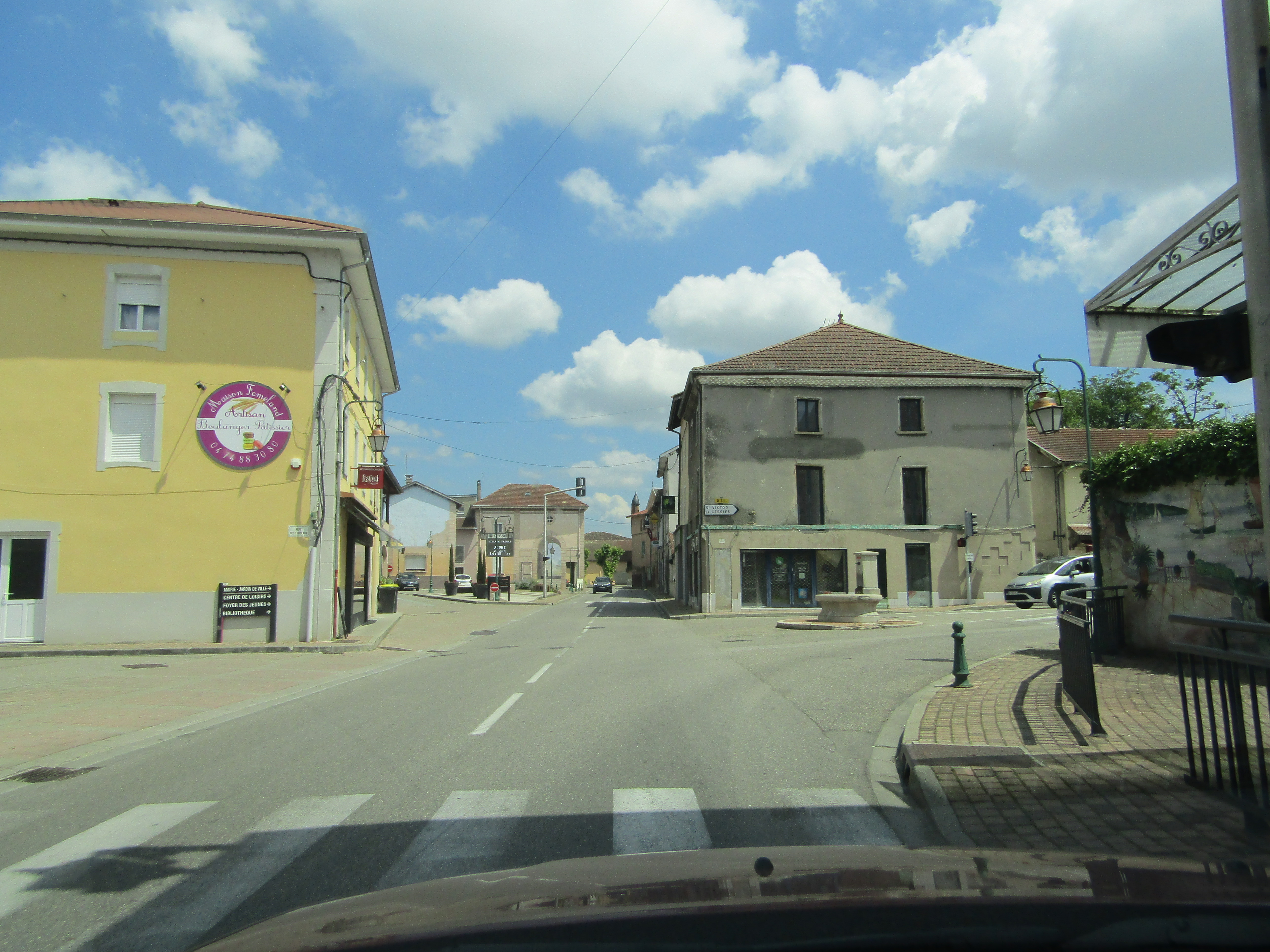 Cessieu (route nationale) en juin 2019